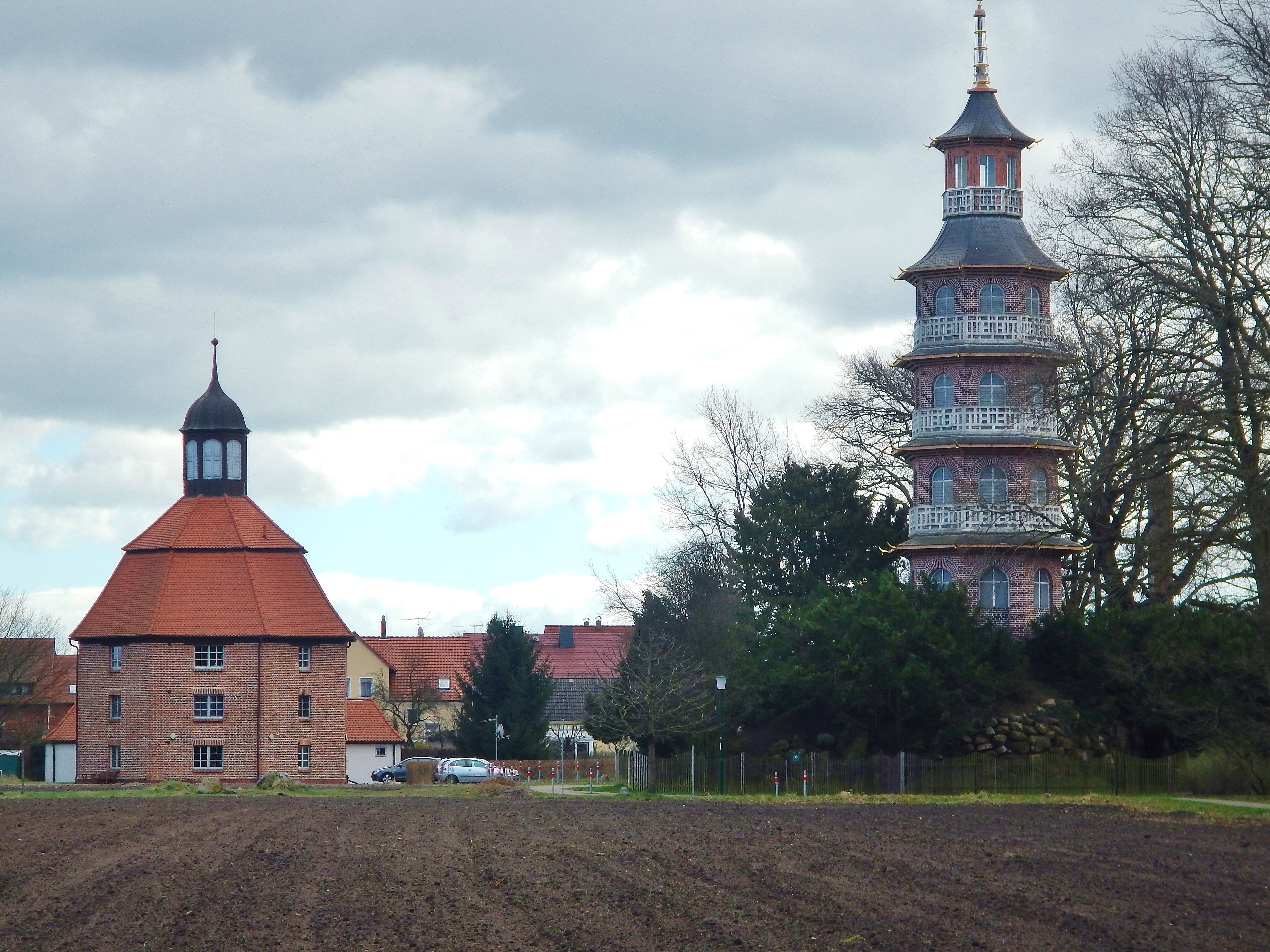 Schloss Oranienbaum in Oranienbaum-Wörlitz mit Pagode im Englisch-chinesischen Garten